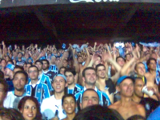 Foto minha tirada no Jogo de Gremio e Cúcuta